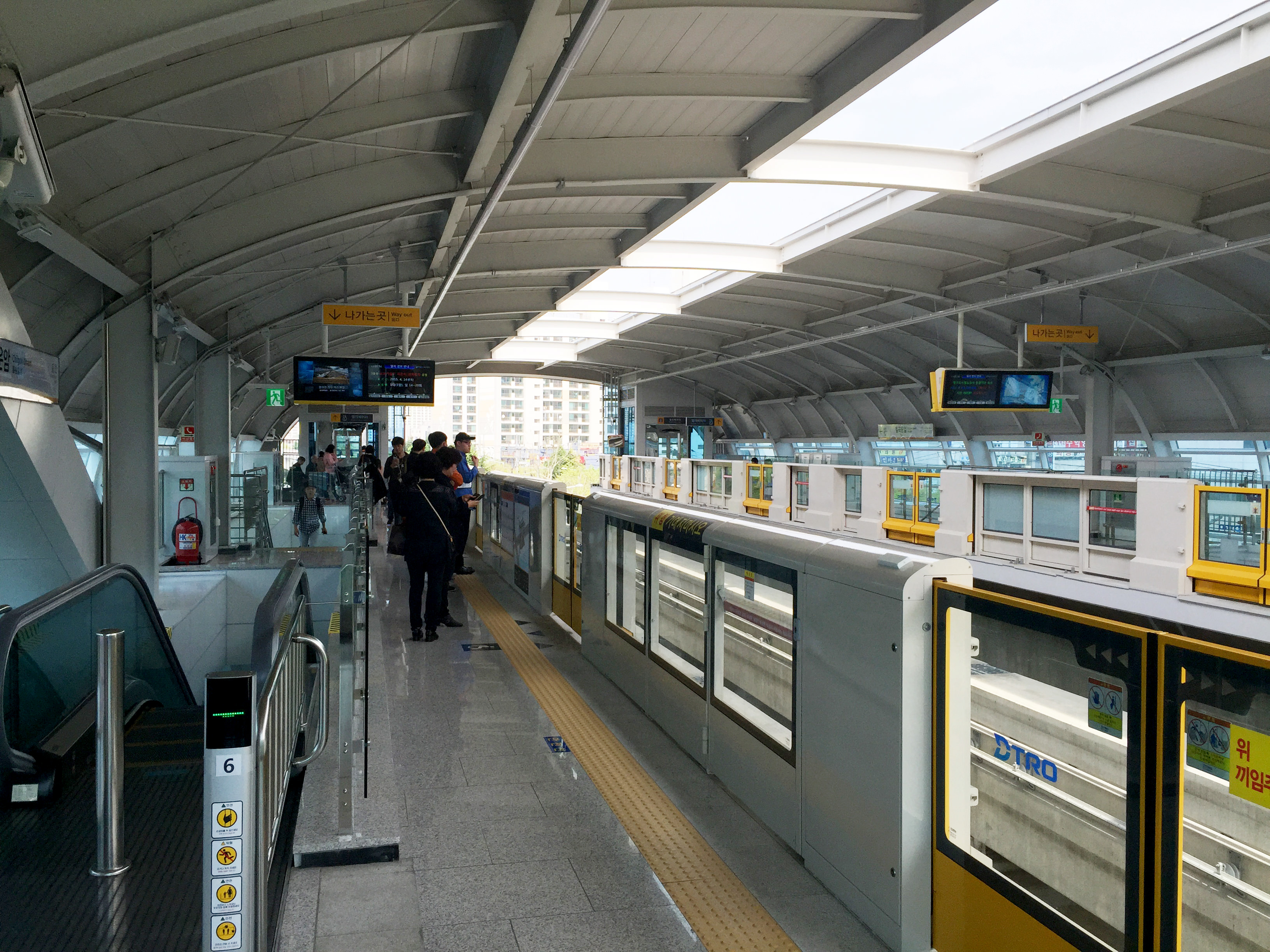 칠곡운암역 승강장